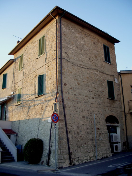 Casa-torre sul lungocanale Cristoforo Colombo a Castiglione della Pescaia